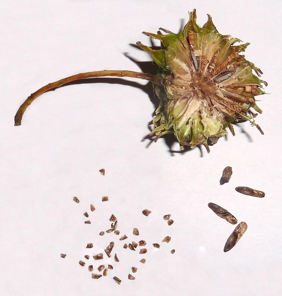 Liquidambar styracyflua (liquidámbar americano) : Fruto multicápsular cortado longitudinalmente, con semillas in situ y sueltas (abortadas y aladas) - ornamental, Plaza de Felipe II, Madrid (España).